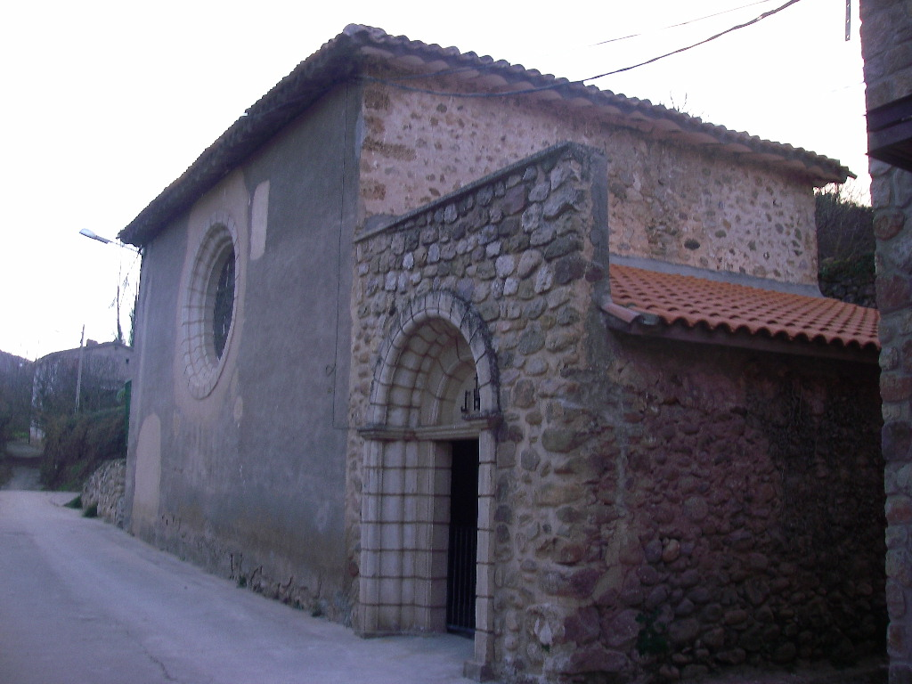 Santa Lucía's Hermitage in Panzares (La Rioja, Spain)